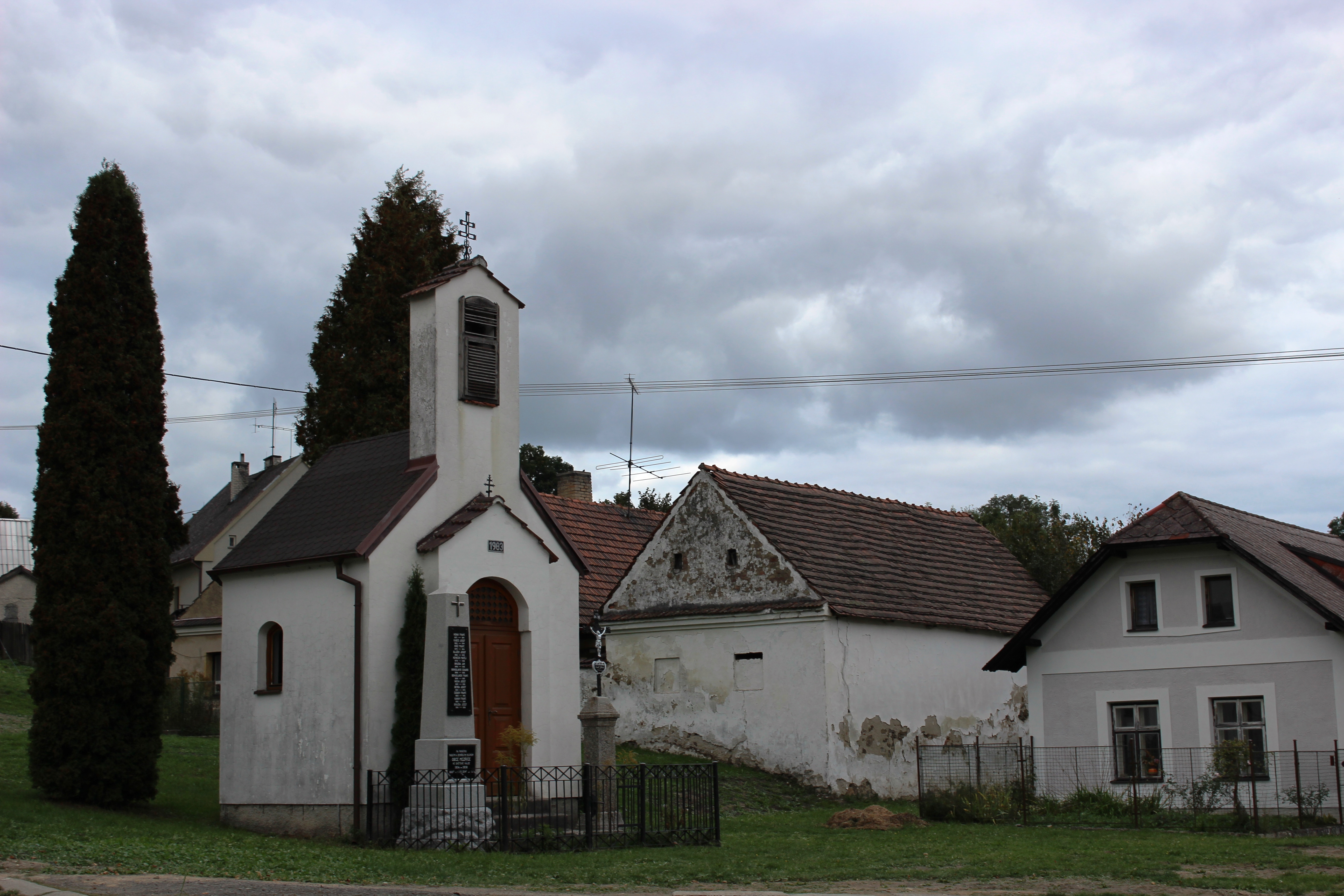 Kaple v obci. Meziříčí (okres Tábor). Česká republika.